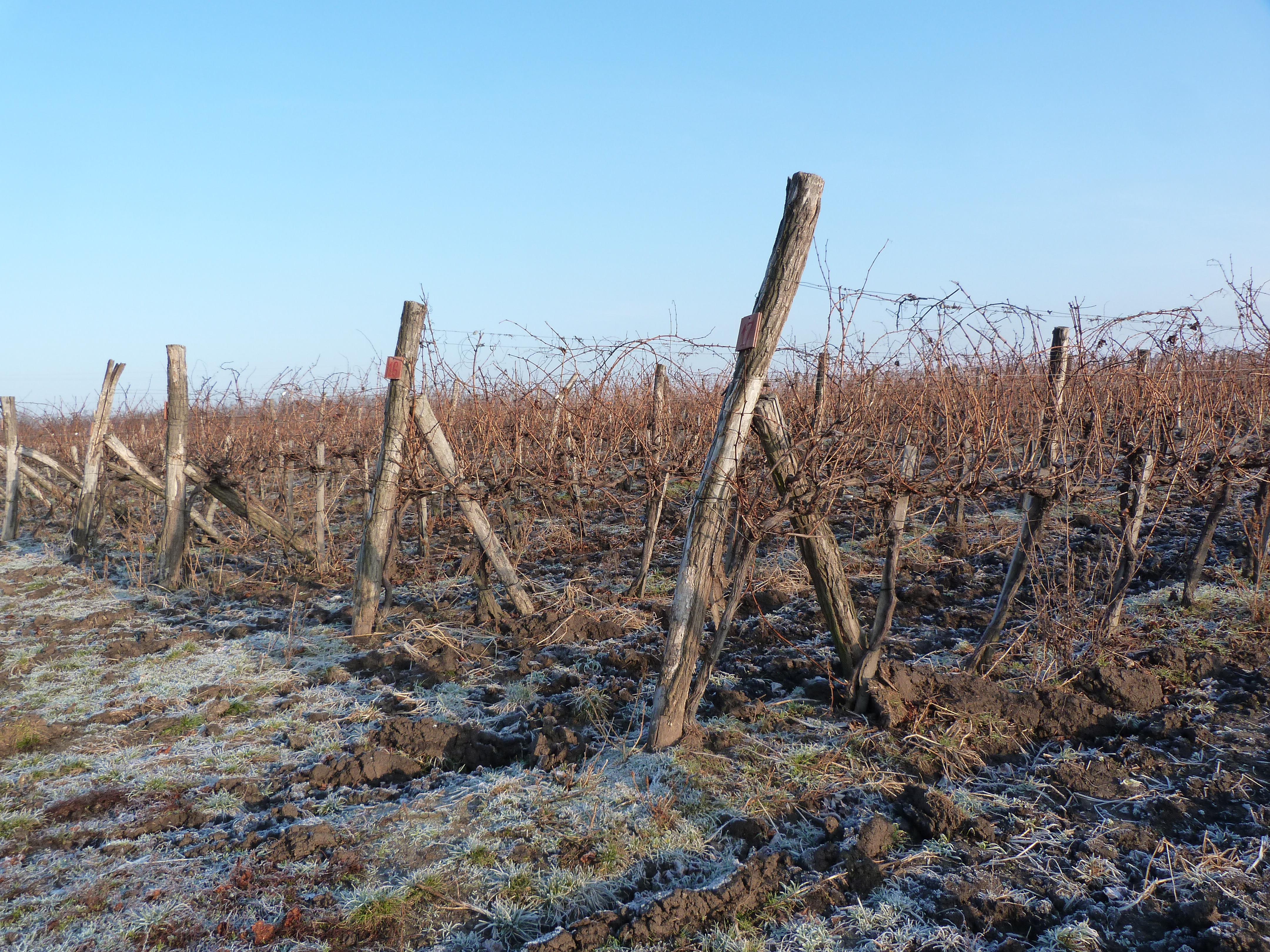 A felvétel 2015. január 14-én szerdán készült Novajon. ©© Derzsi Elekes Andor, Budapest, 2014, A kép egészben, vagy részletekben másolását, bármilyen úton történő sokszorosítását és felhasználását a szerző ellenérték nélkül, jogutódjaira is kihatóan megengedi. Az engedély kiterjed a kereskedelmi célú hasznosításra is. Kéri azonban nevének feltüntetését a felhasználás során. A Metapolisz sorozat valamennyi képe és filmje Creative Commons alatti valamint kereskedelmi - for profit - célra is felhasználható. Ajánlott hivatkozás: Derzsi Elekes Andor: Metapolisz DVD line